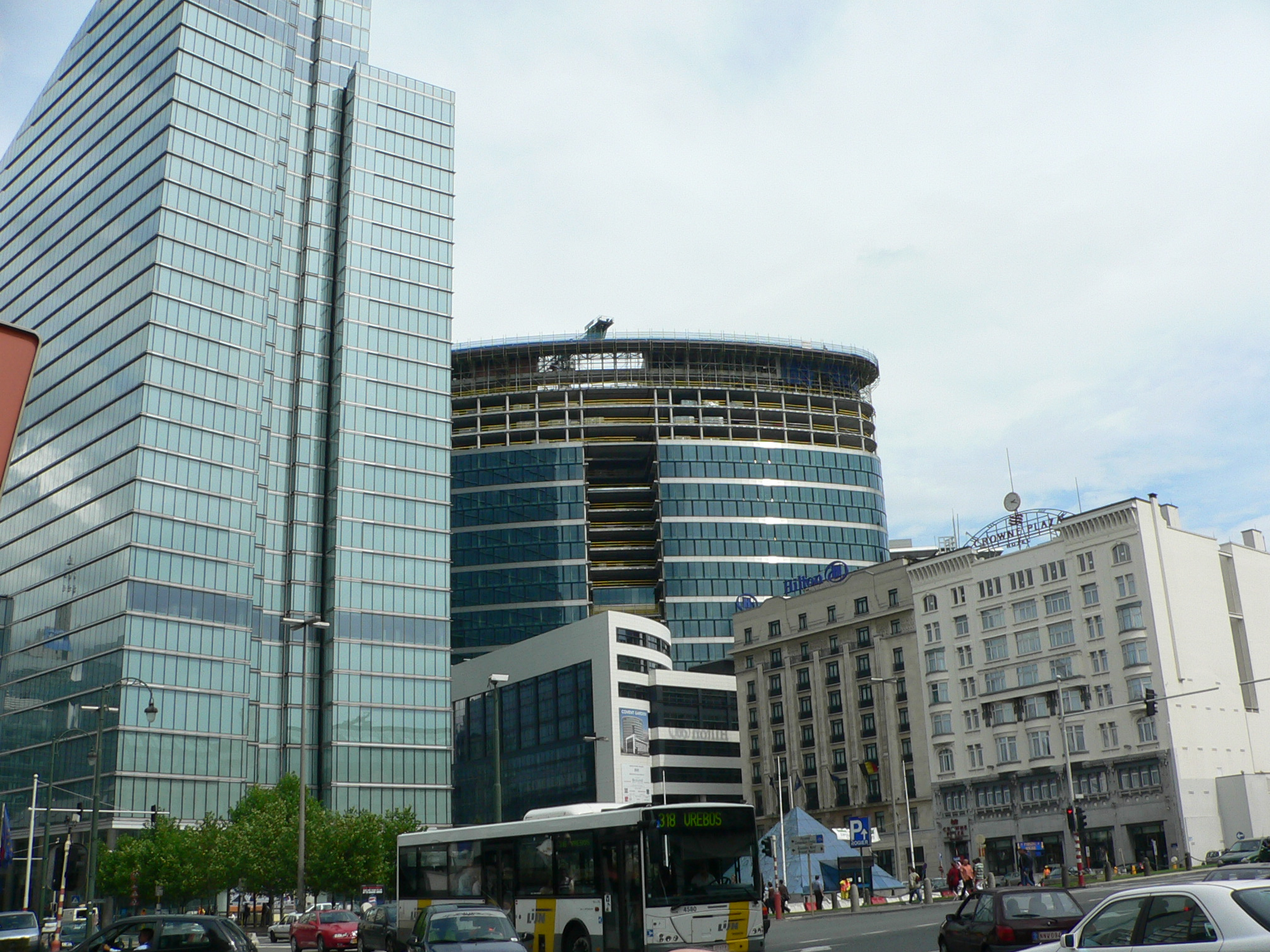 E p-Poulsen de cette photo cède tous mes droits à la Fondation Wikimedia et Wikipedia. Cette photo est entièrement libre